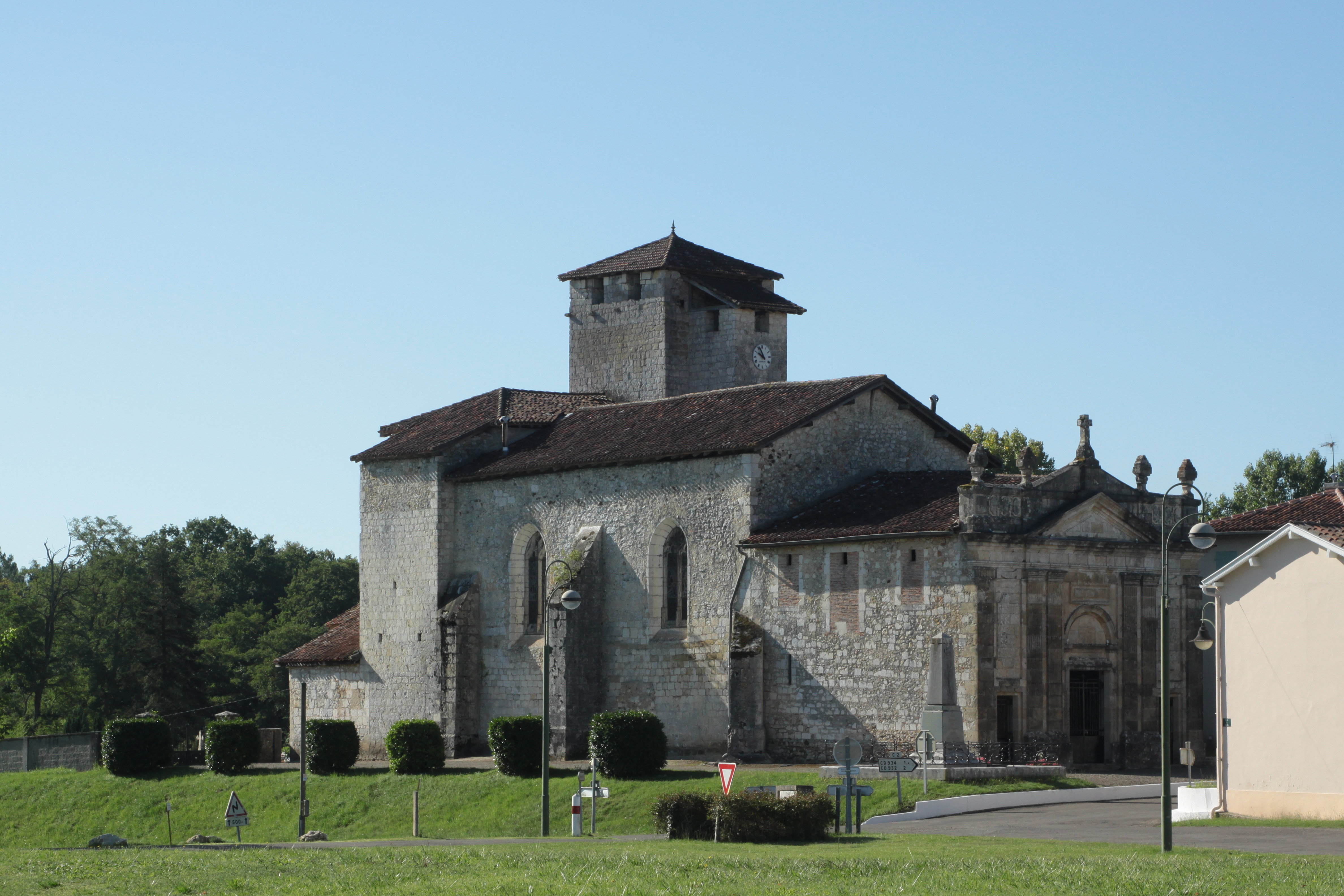 Église Saint-Pierre de Sarbazan